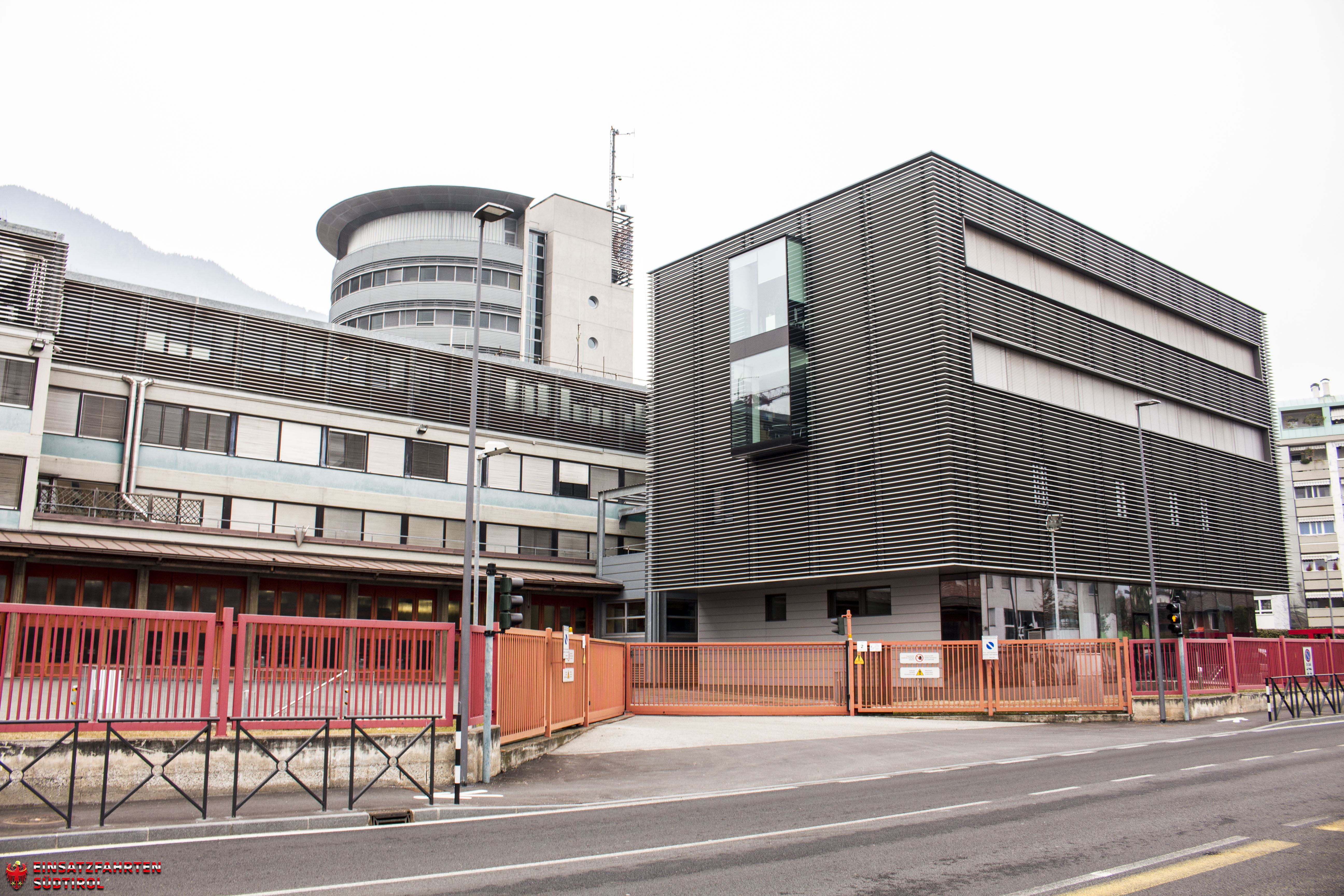 Die Südtiroler Landesnotrufzentrale (LNZ) in der Bozner Drususstraße. Links davon die Bozner Berufsfeuerwehr.